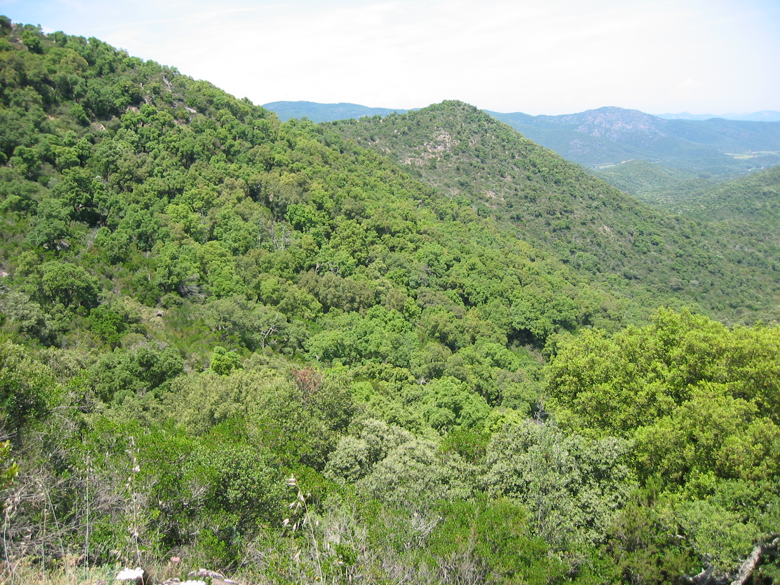 Massif des Maures, Var, France La forêt. 16 june 2002 Author : civodule